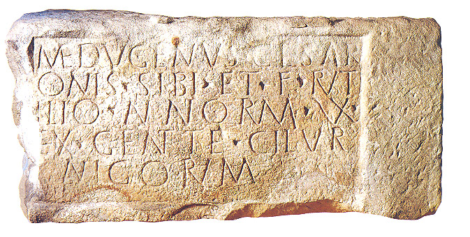 Lápida funeraria donde se cita la gens de los Cilúrnigos.Corresponde con la inscripción HEp. 4, 66, y su texto dice: MEDVGENVS CESAR/ONIS SIBI ET F(ilio) RVT/ILIO ANNORVM VX (sic) / EX GENT{T}E CILVR/NIGORVM